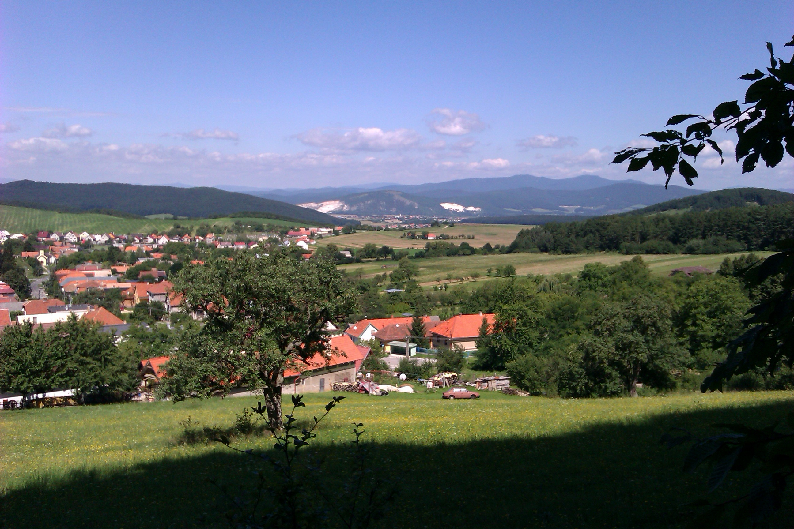 972 48 Radobica, Slovakia